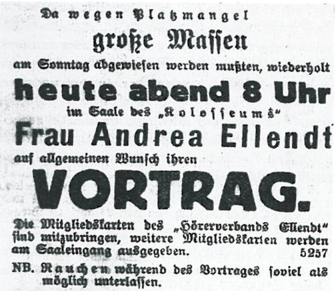 Ankündigung eines Vortrags der völkischen Agitatorin Andrea Ellendt in der Kitzinger Zeitung vom 6. September 1922.